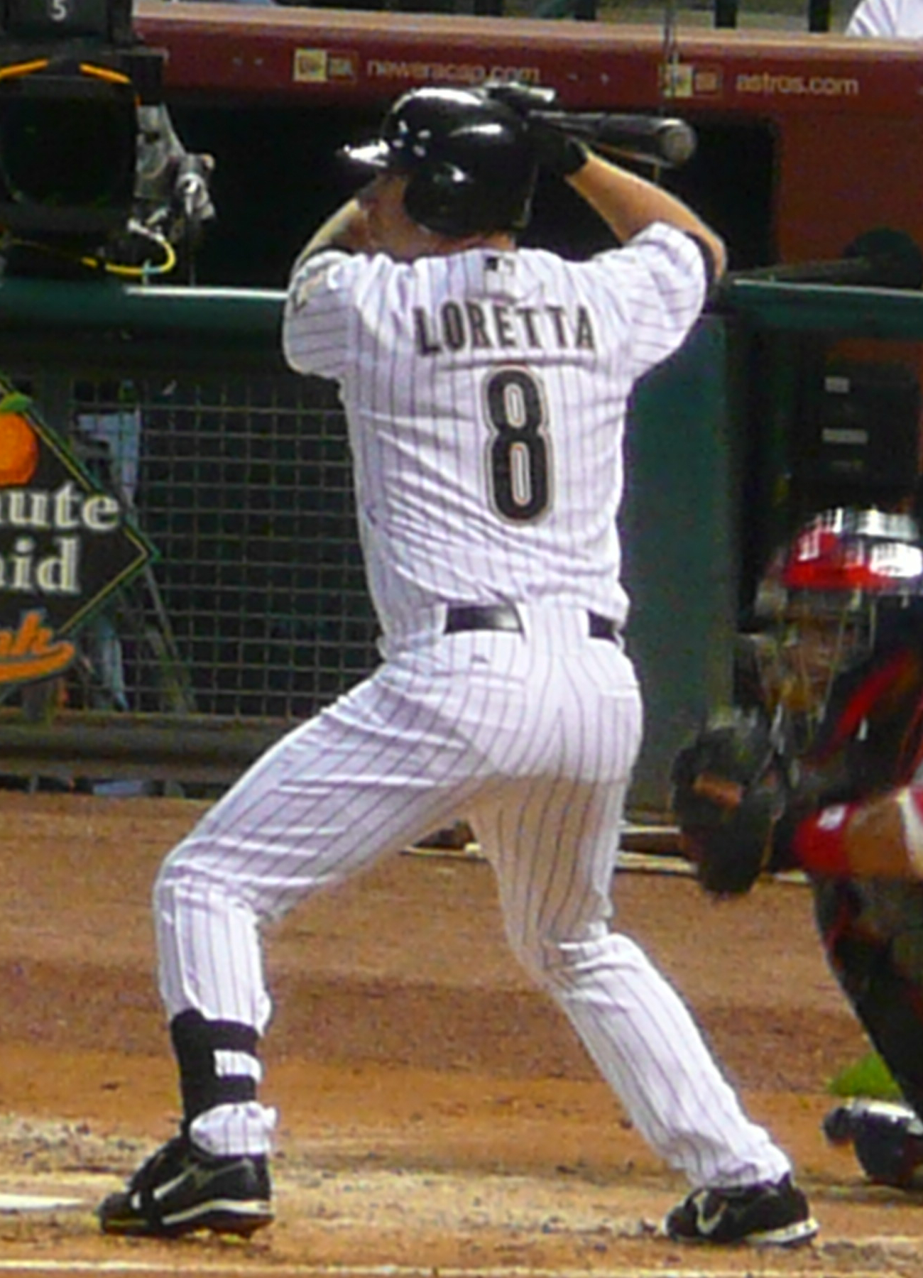 Mark Loretta